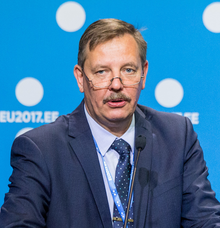 Taavi Aas, Tallinna linnapea kohusetäitja